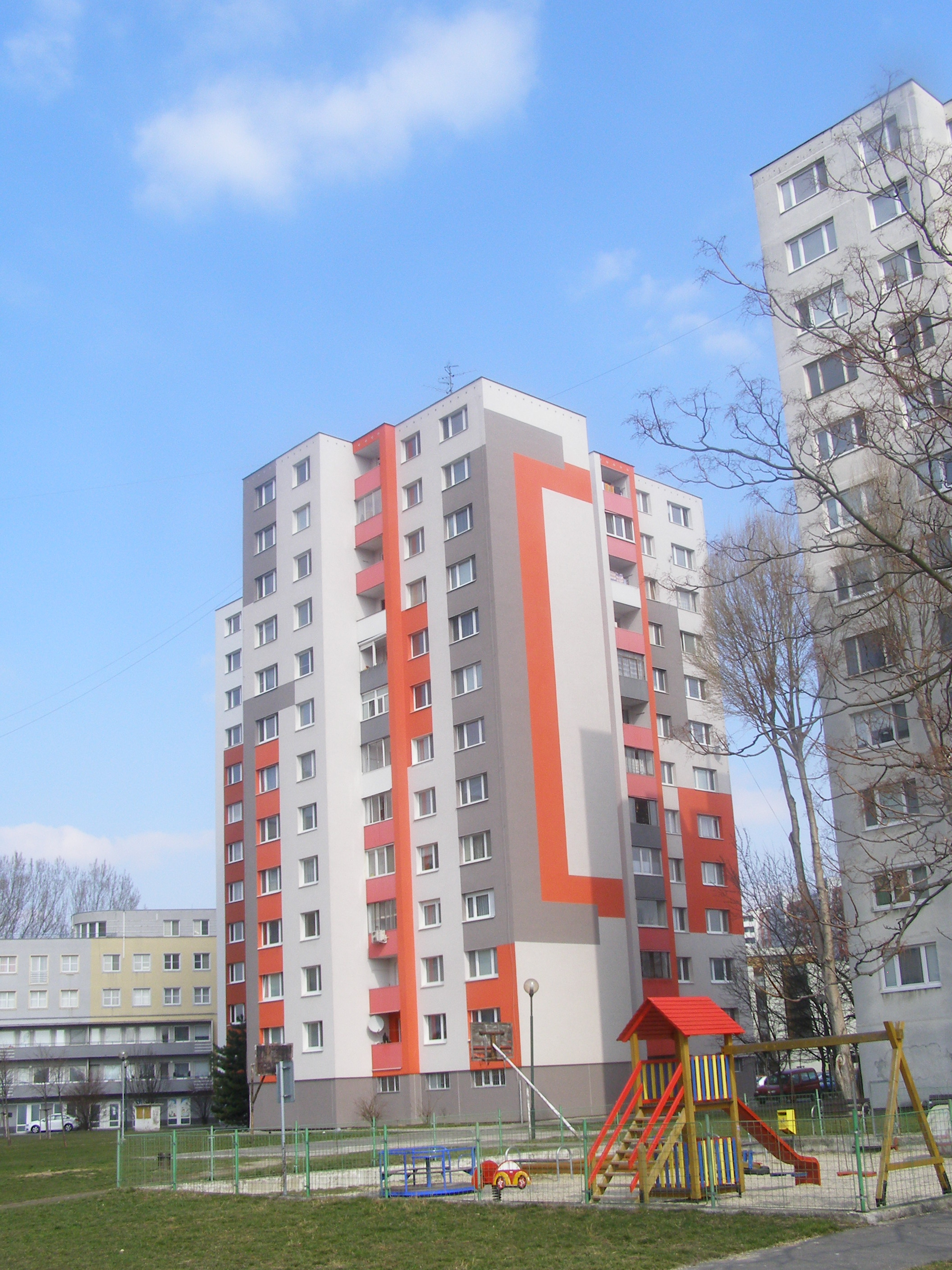 obytný dom Andrusovova